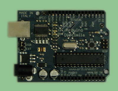 Arduino